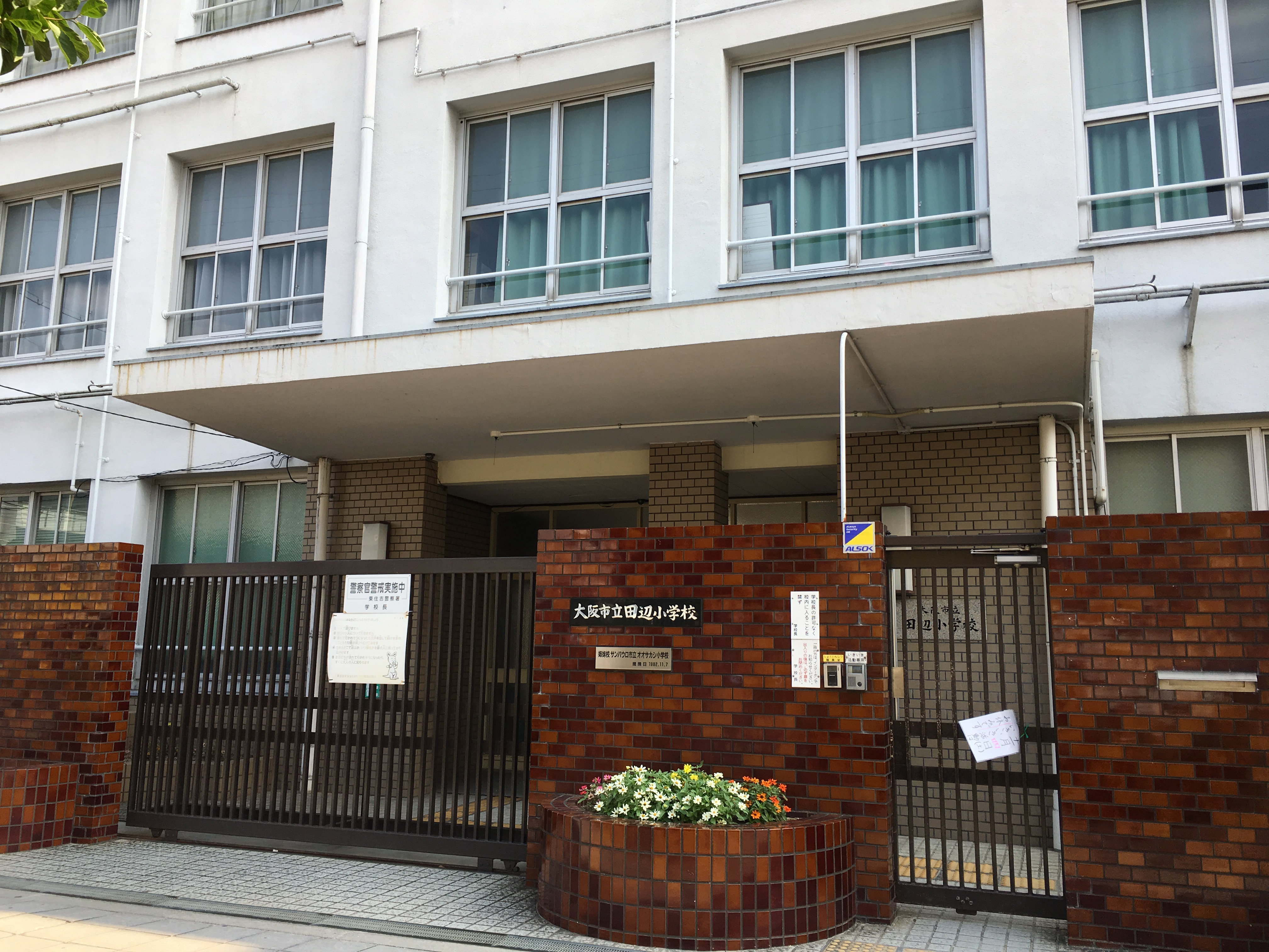 田辺小学校